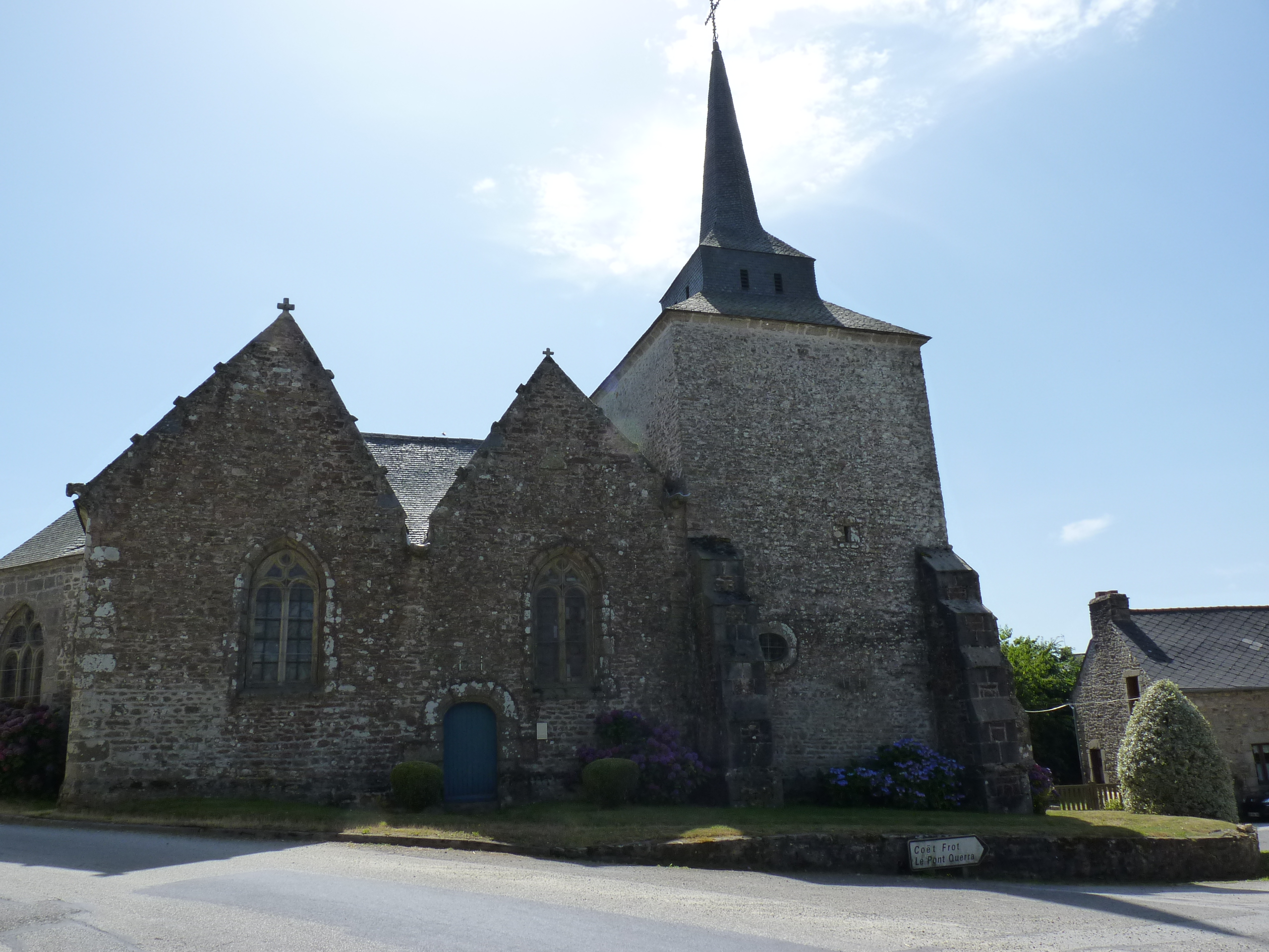 Chapelle mi romane, mi gothique.